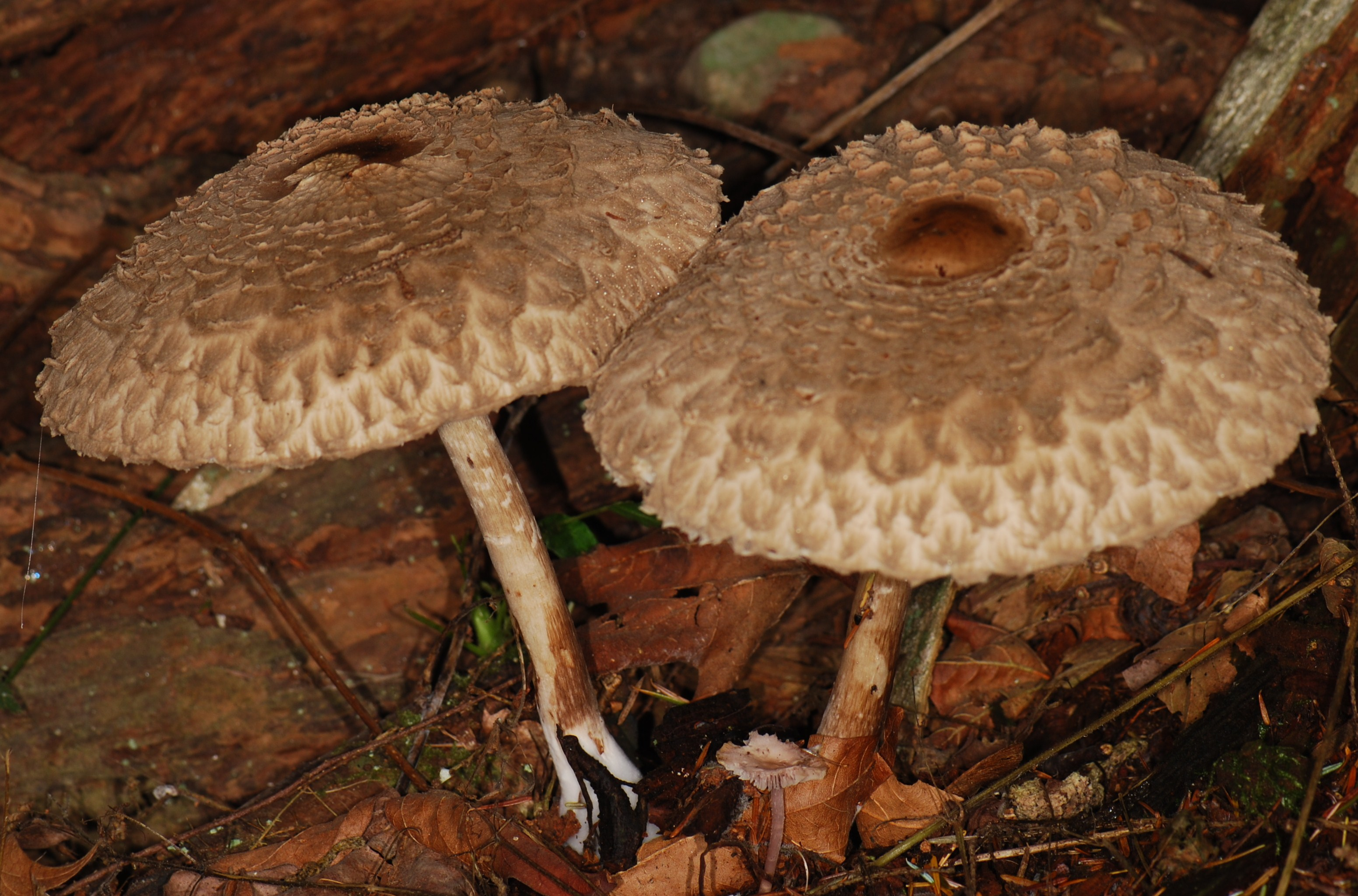 Lepiota rachodes in situ